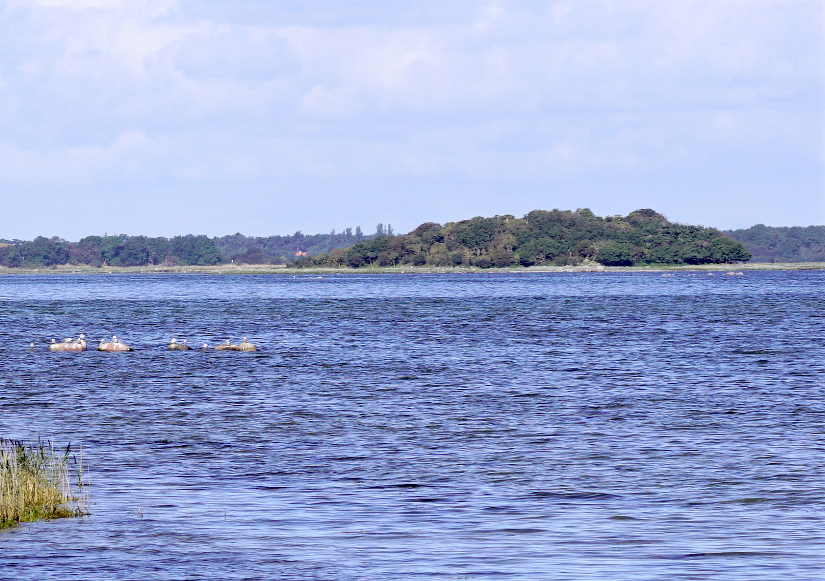 Eskeholm i Stavns Fjord set fra Besser Rev